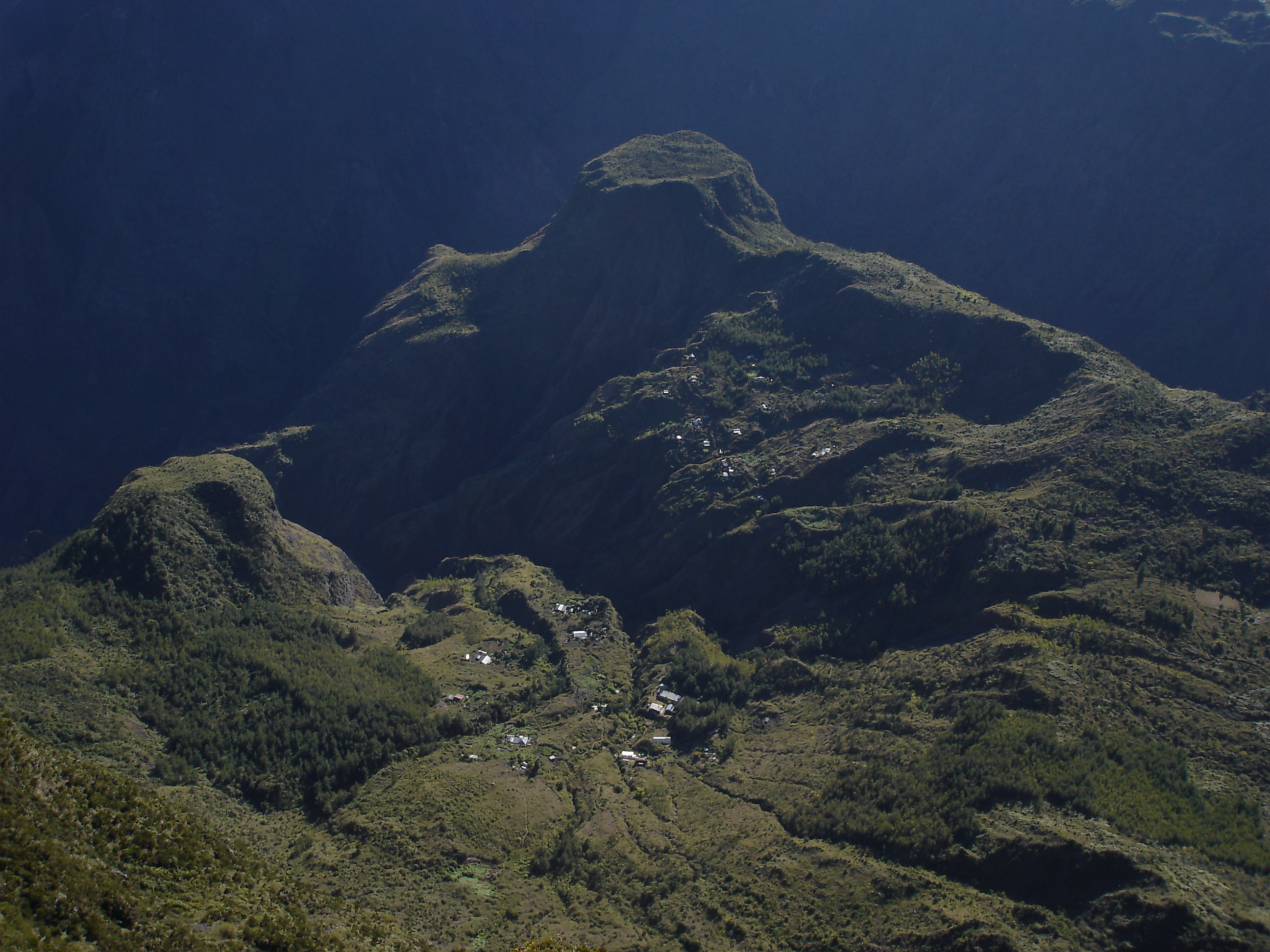 Description: Mafate depuis le Maïdo, montrant le Bronchard, dominant l'Ilet de Roche Plate, november 2004, La Réunion Source: Bouba